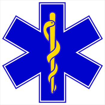 این نماد برای نشان دادن مجموعه اورژانس پیش بیمارستانی یا فوریتهای پزشکی استفاده می شود